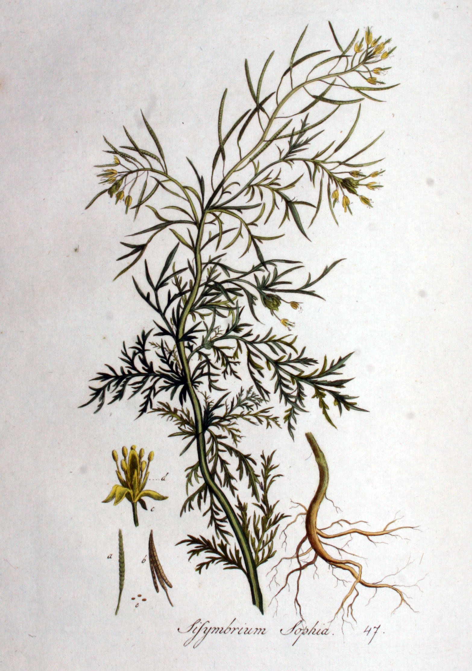 Descurainia sophia (Richards.) O.E. Schulz (Syn. Sisymbrium sophia L.)